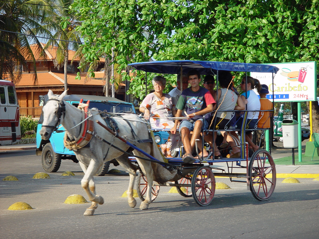 Horse taxi on Cuba (Varadeiro)